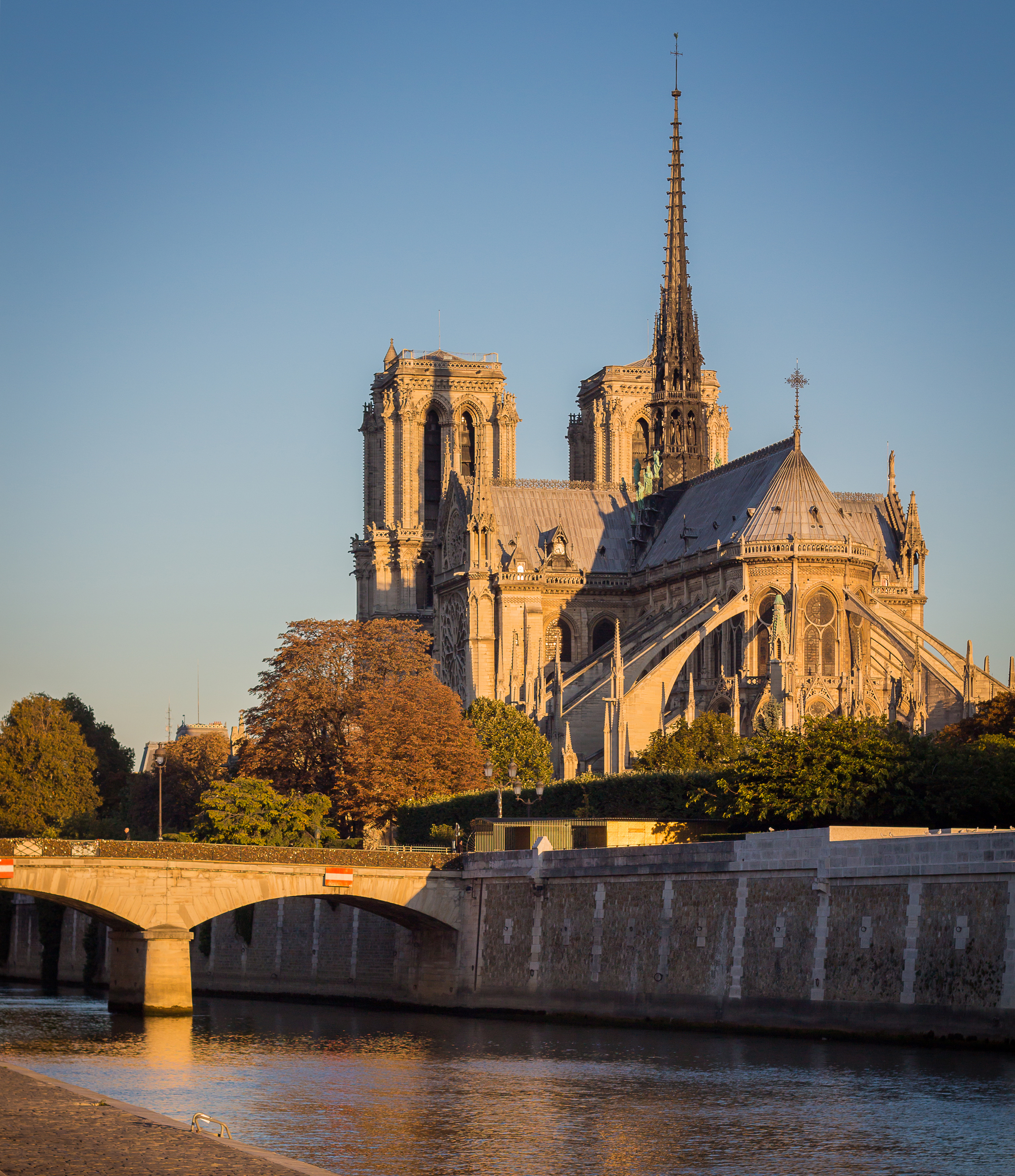 Cathédrale Notre Dame, à Paris, vue de la rive gauche à l'arrière